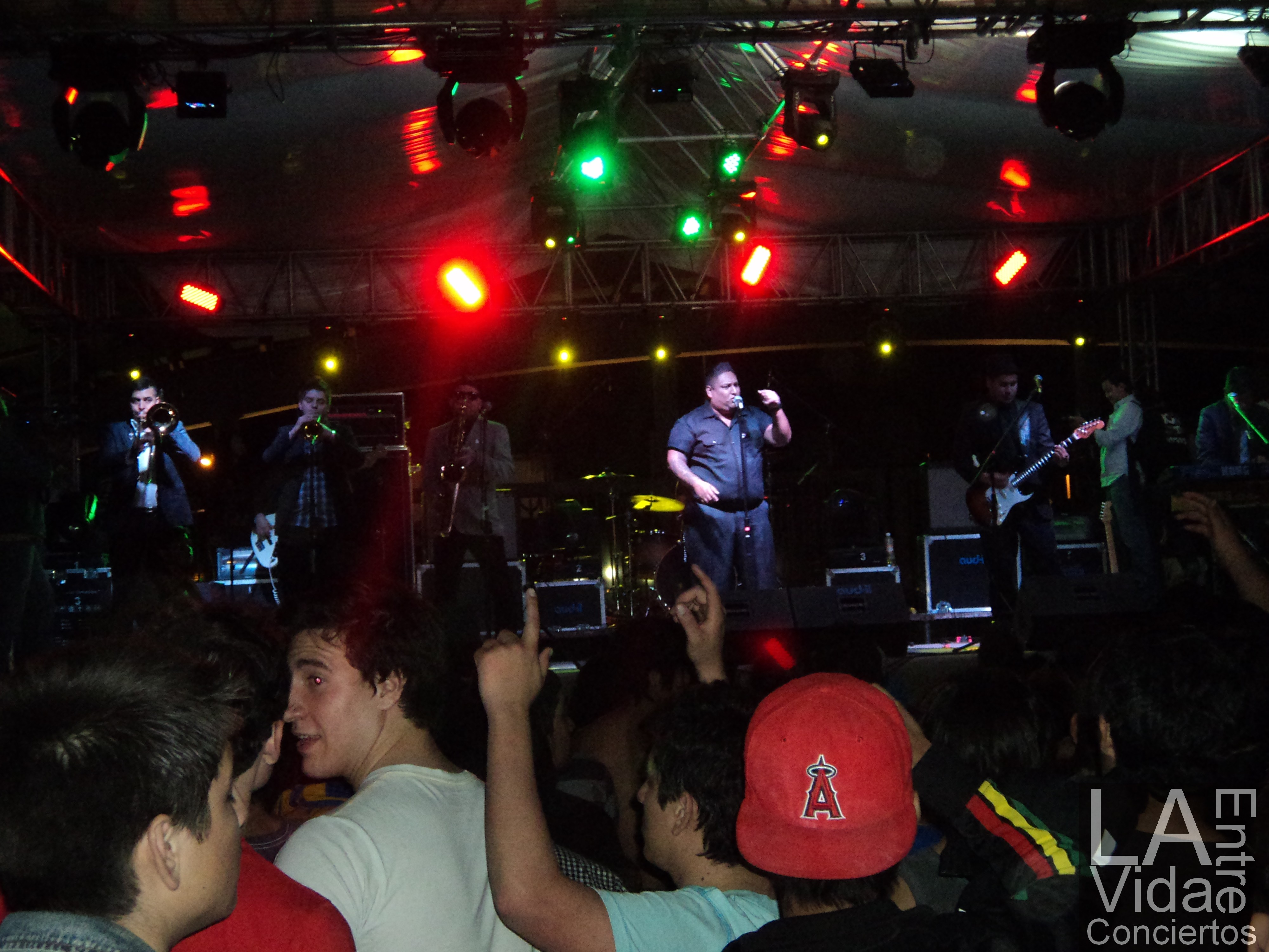 Inspector en FutRock Fundidora en su 16 aniversario